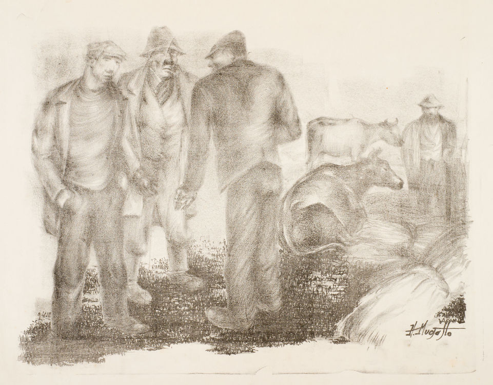 "Lehmakauplejad" (1932). Litograafia, paber. Km 39,2 x 51,7; lm 46 x 73,5 cm